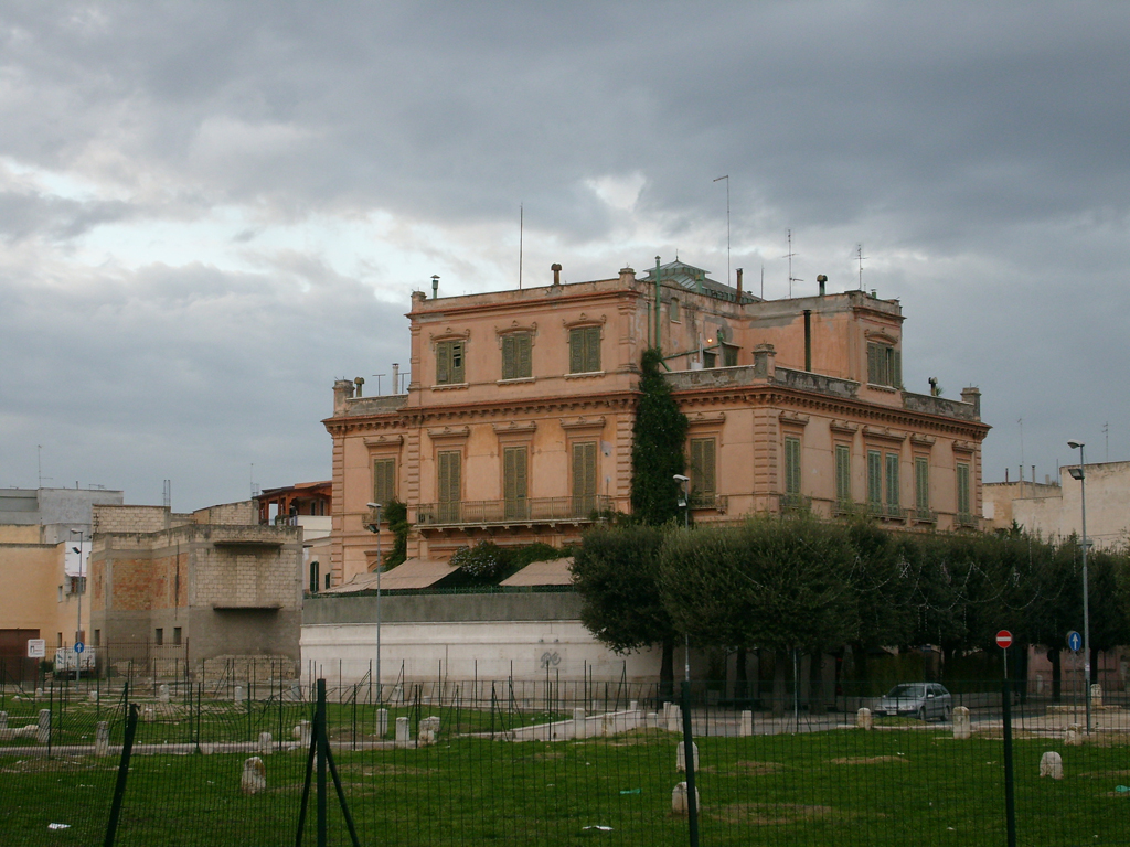 Veduta di Palazzo Pavoncelli di Cerignola (FG).